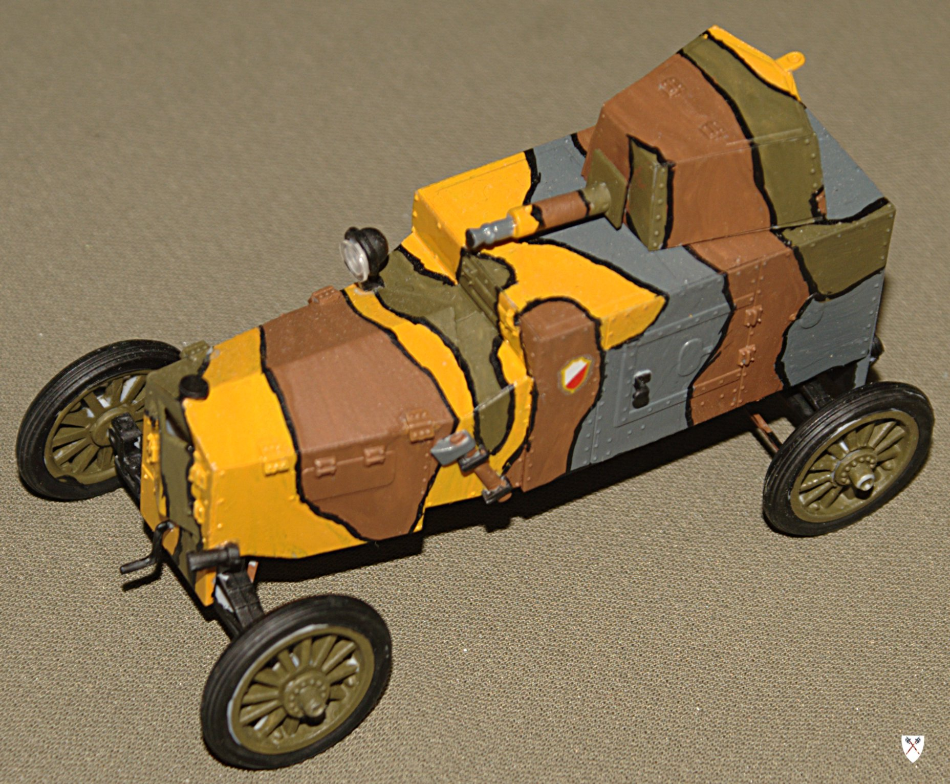 Model samochodu pancernego FT-B w Pomorskim Muzeum Wojskowym.